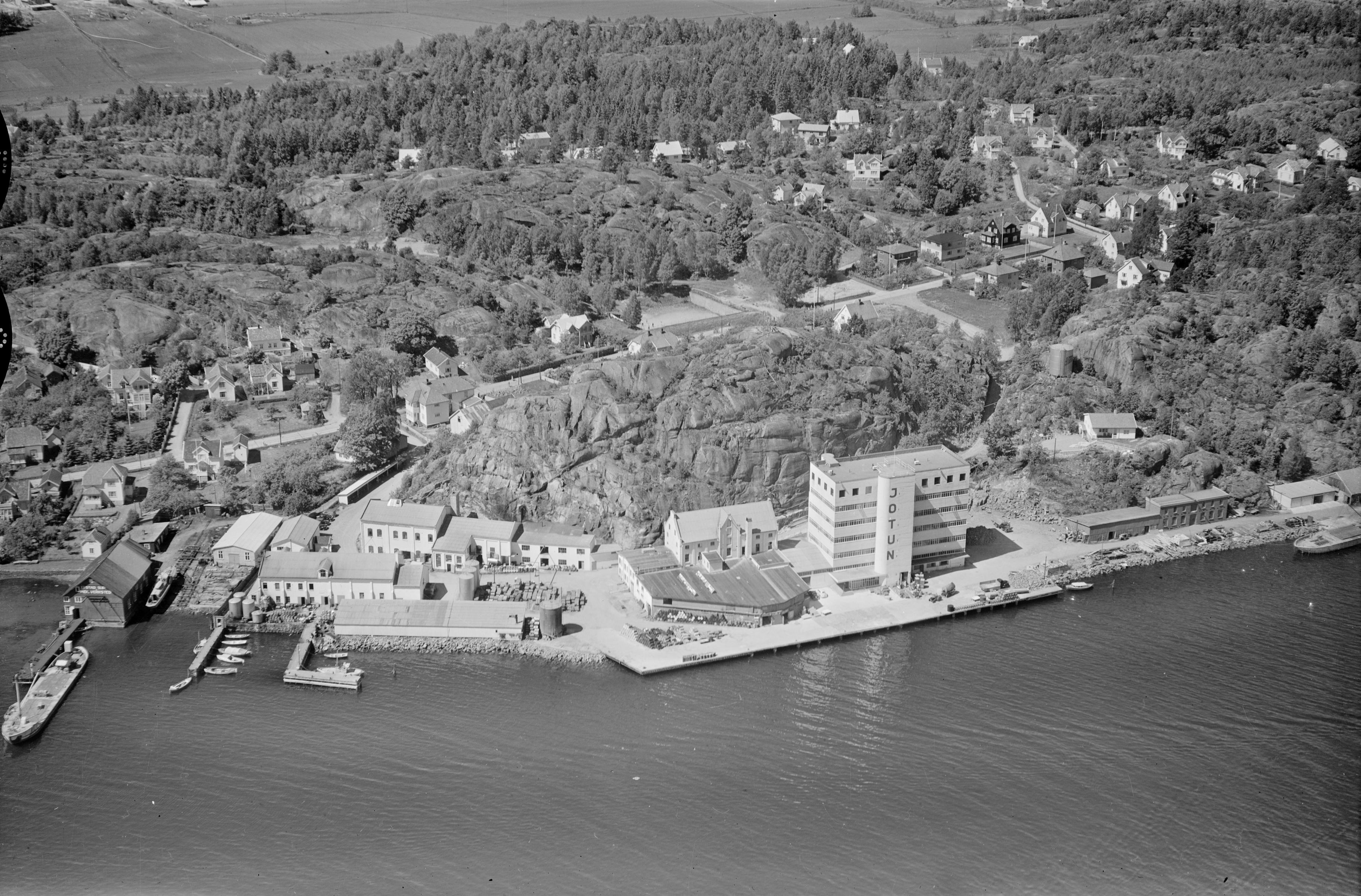 Sandefjord